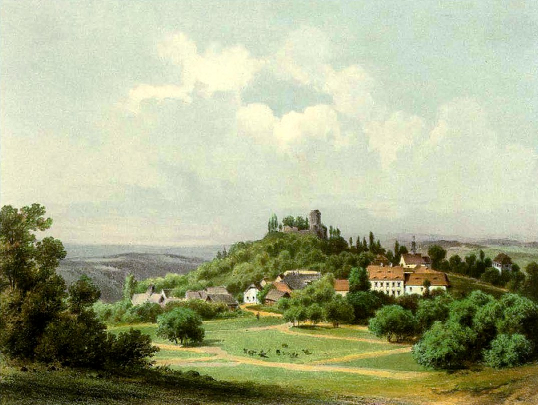 Burg Lähnhaus (Lehnhaus), Kreis Löwenberg, Provinz Schlesien